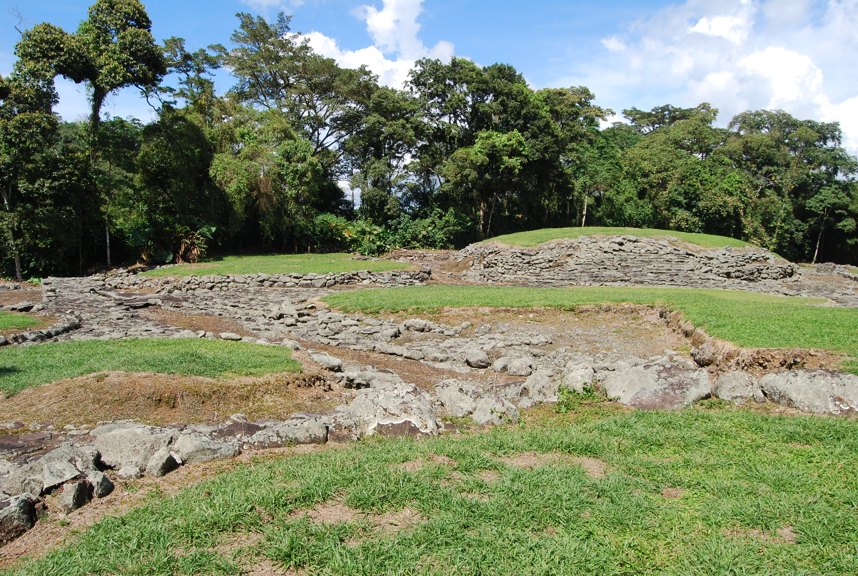 Indian City Guayabo, Cartago